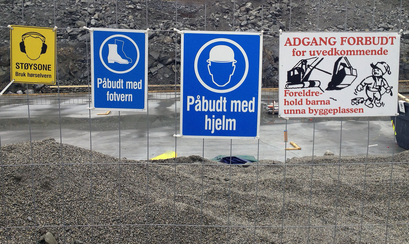 Hørselsvern. Bruk av hjel. Bruk av vervestøvler, vernefottøy. Hold barn vekk fra arbeidsplassen. Arbeidsmiljø, arbeidervern. Skilting på byggeplass i Oslo 2014.